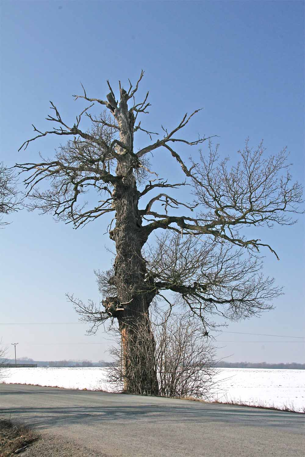 Památný dub u silnice z Borku do Žehušic